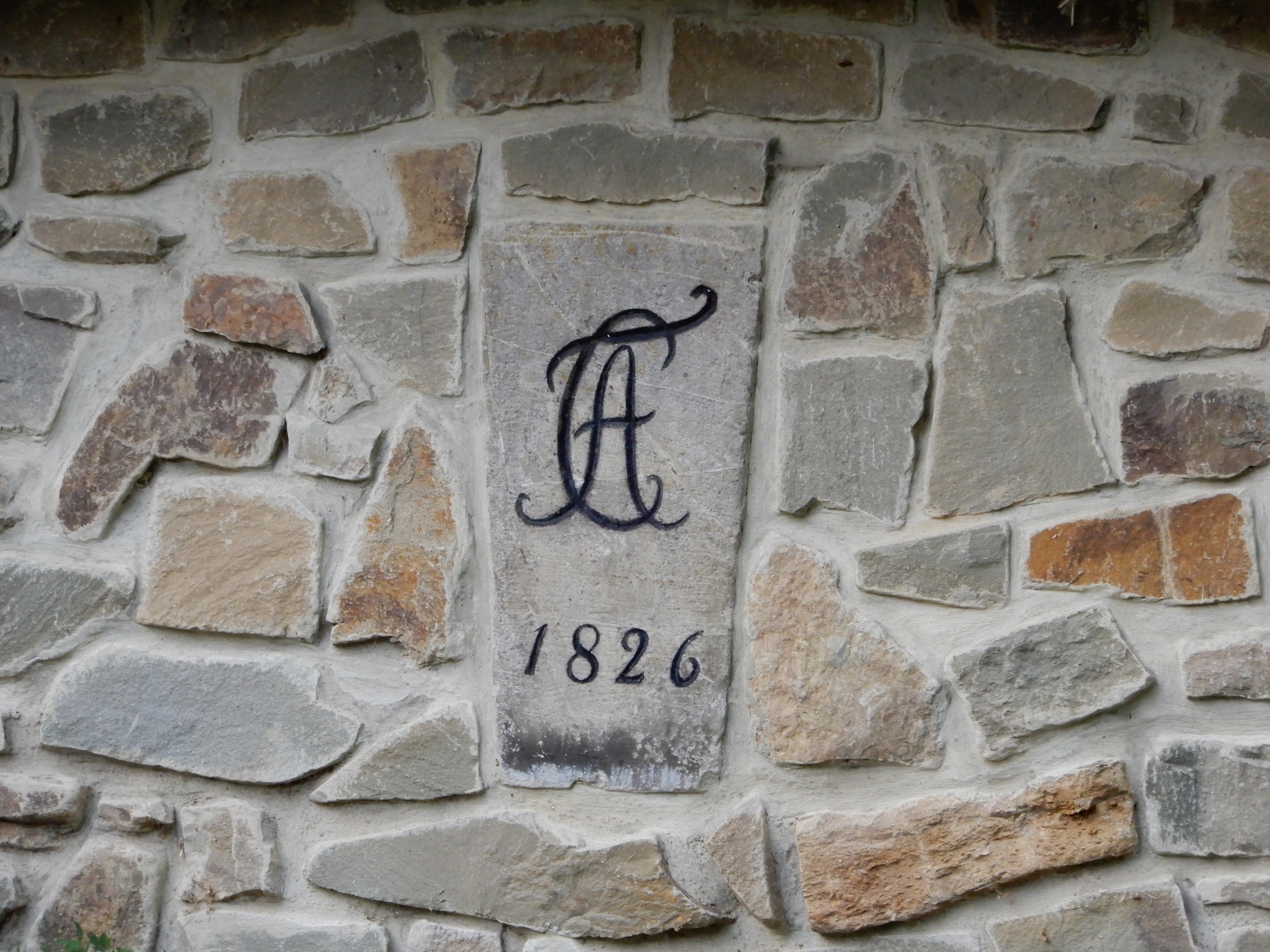 Brücke über die Selke am Hüttengrund, die ursprünglich 1826 errichtete Brücke wurde 2002 nach Hochwasser erneuert